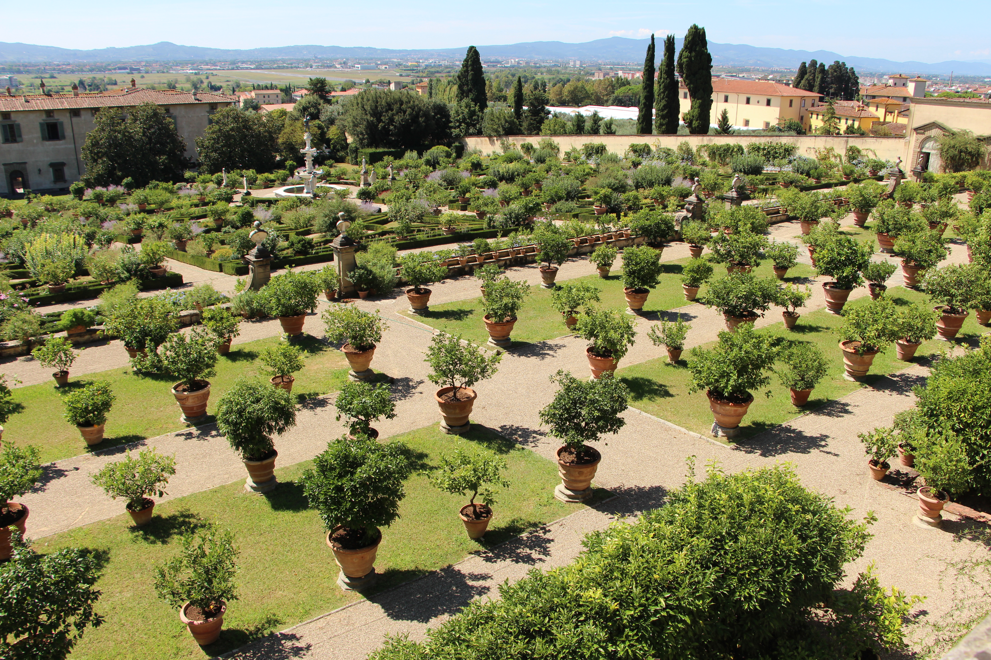 Giardino della Villa medicea di Castello - MIBAC This is a photo of a monument which is part of cultural heritage of Italy.